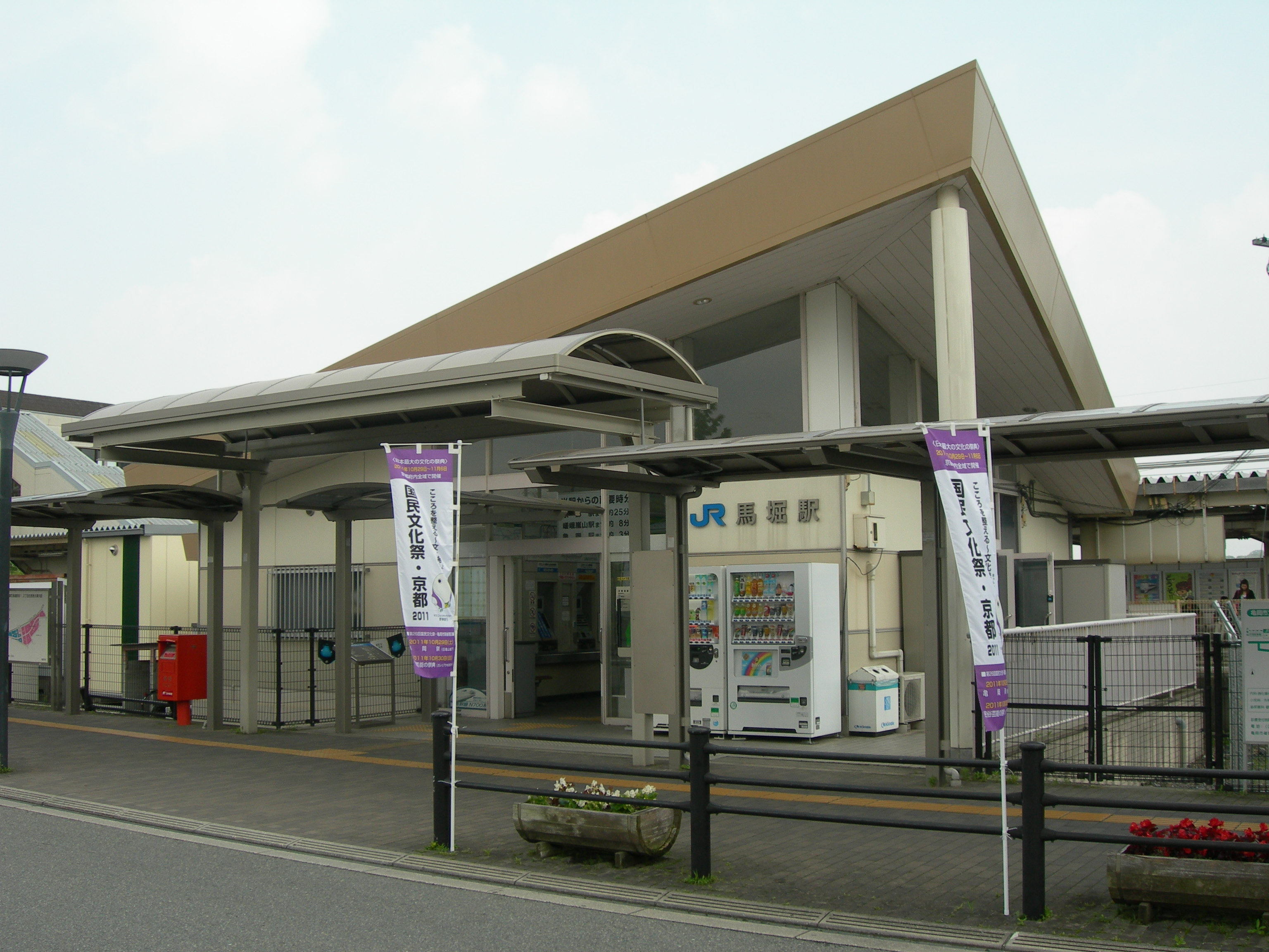 馬堀駅